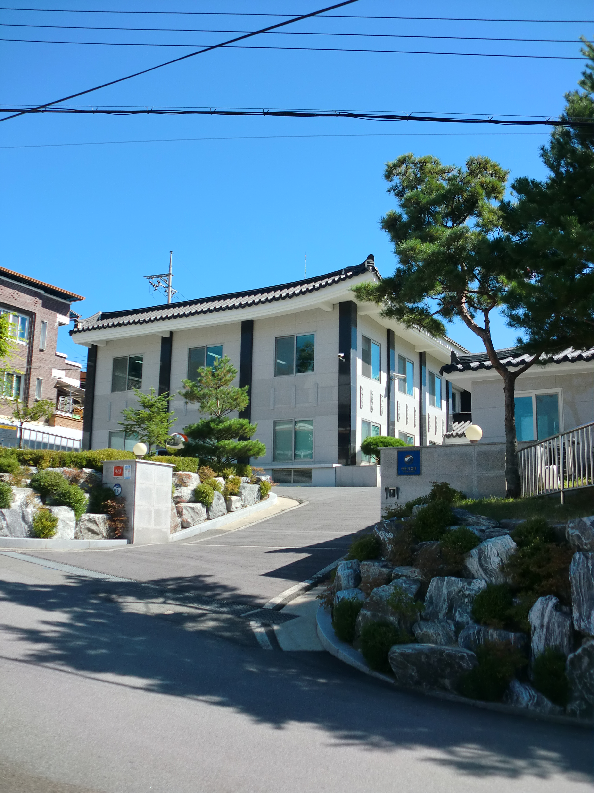 경상북도 안동시에 있는 안동기상대